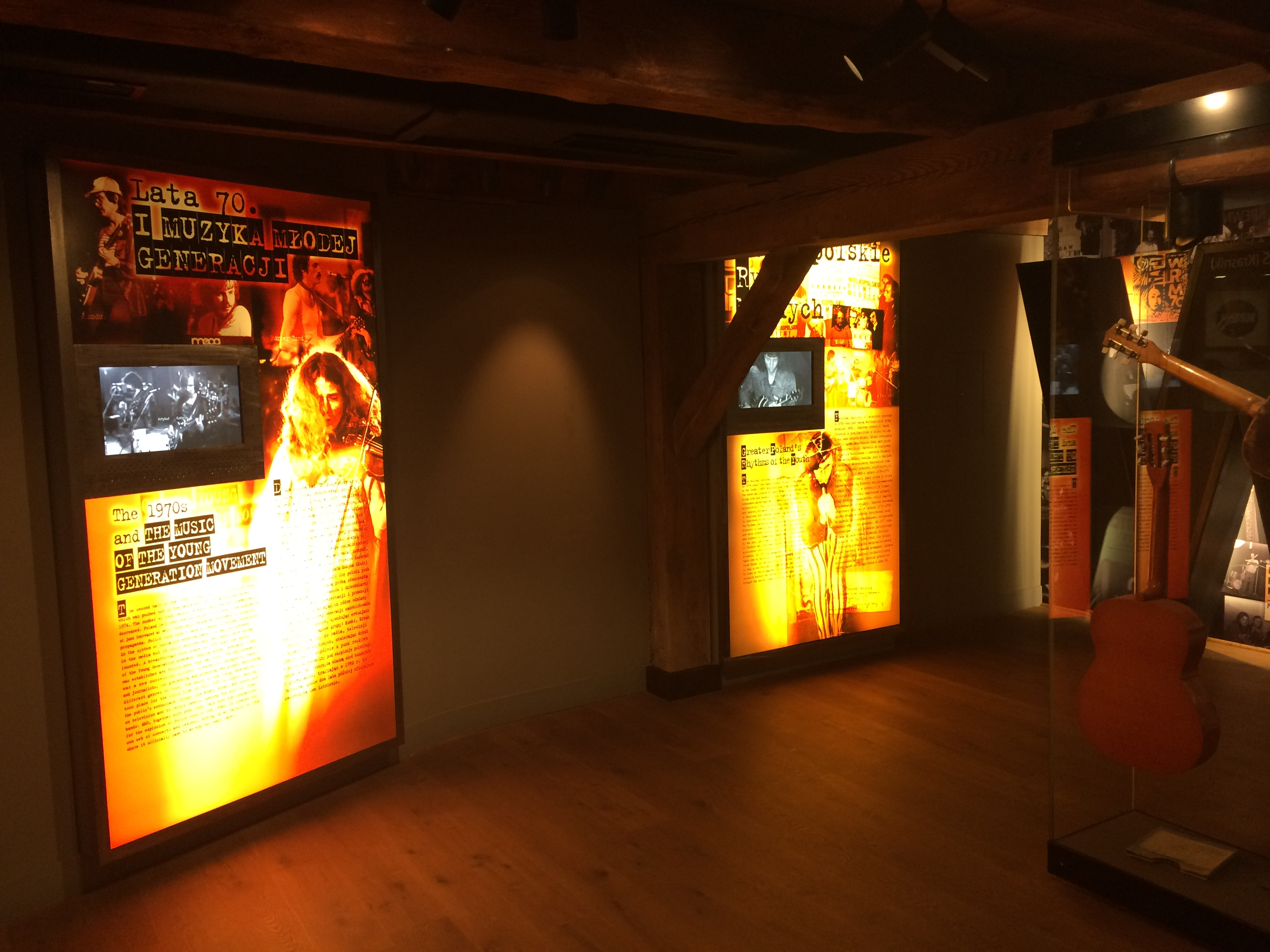 Wystawa w jarocińskim Spichlerzu Polskiego Rocka - sekcja poświęcona Muzyce Młodej Generacji